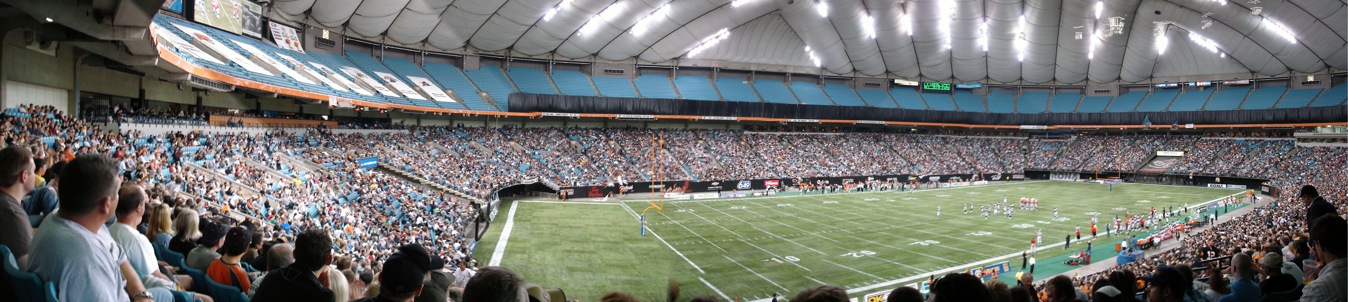 BC Place Vancouver